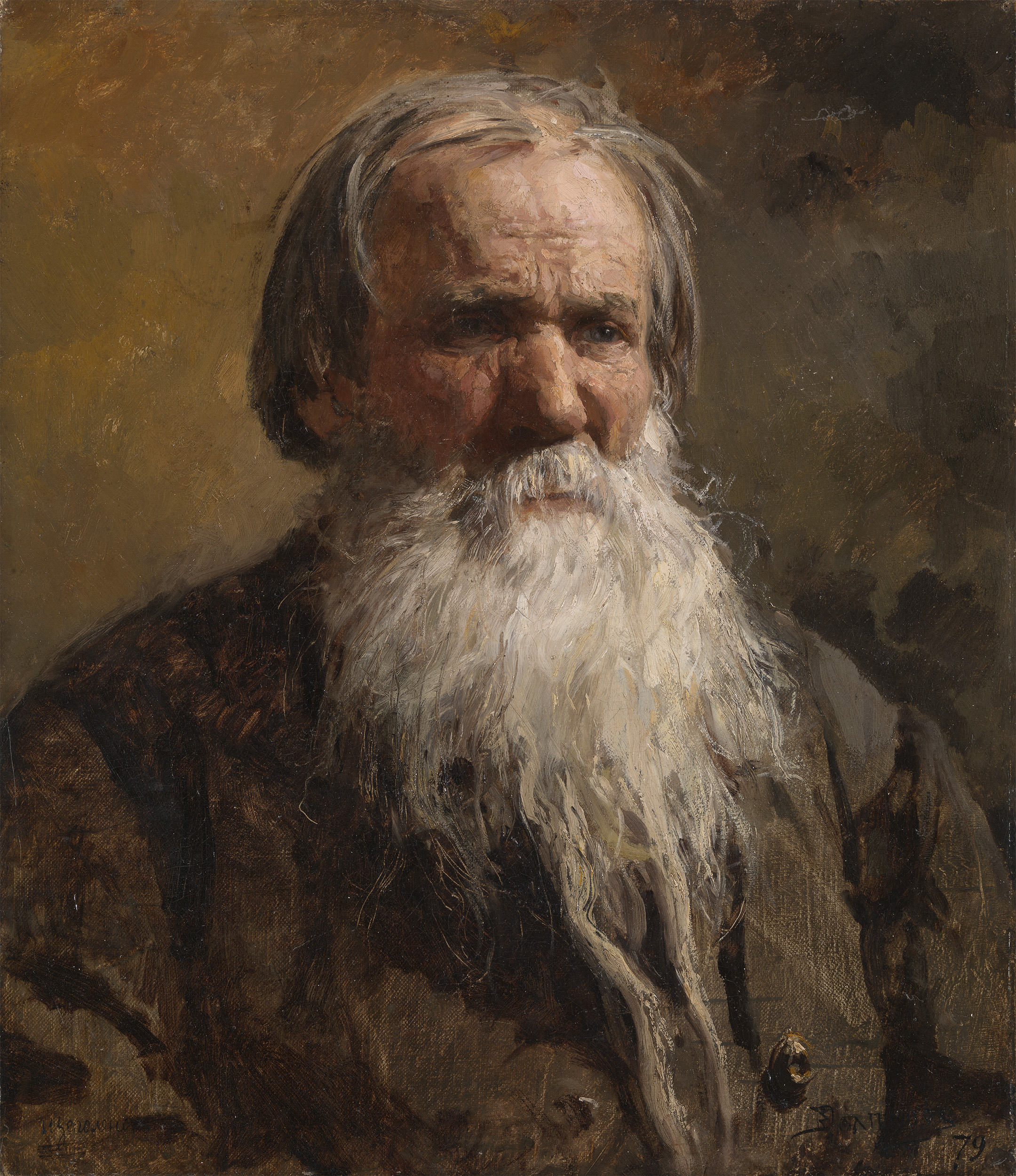 Портрет Василия Петровича Щеголёнка